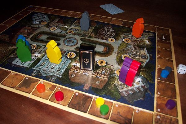 Jeu de société Heimlich & Co